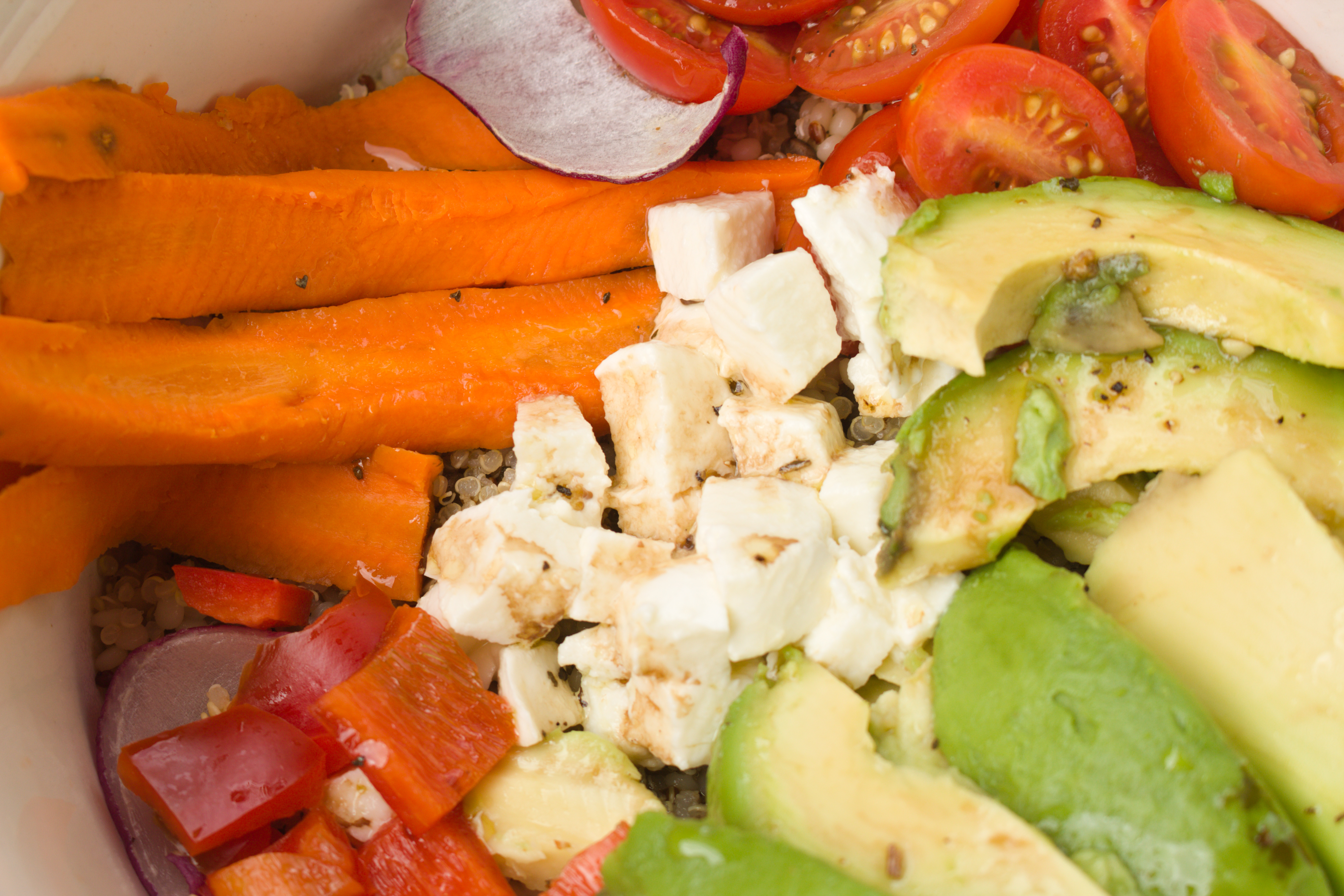 Buddha Bowl